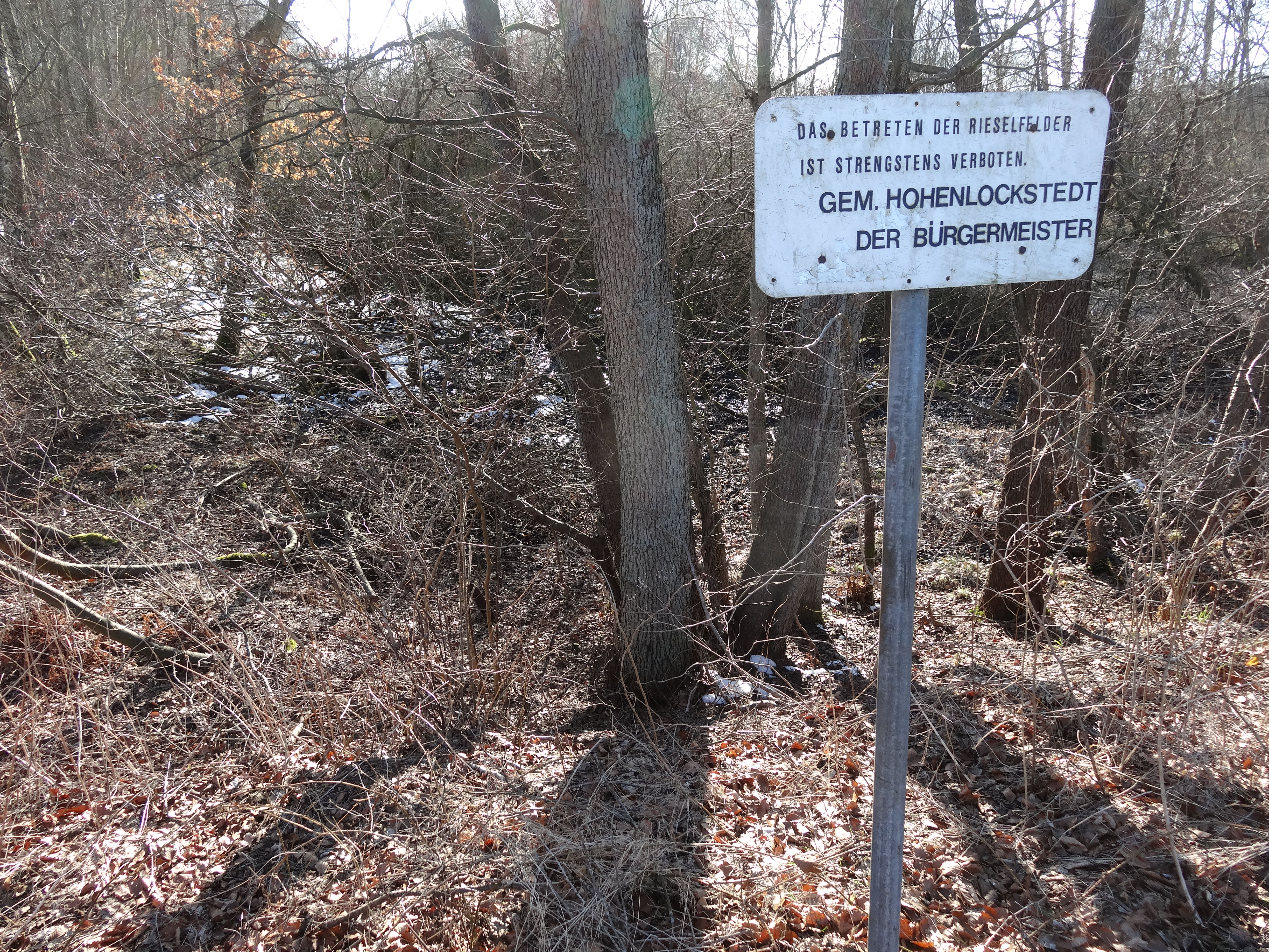 Verbotsschild vor den Rieselfeldern in Hohenlockstedt.